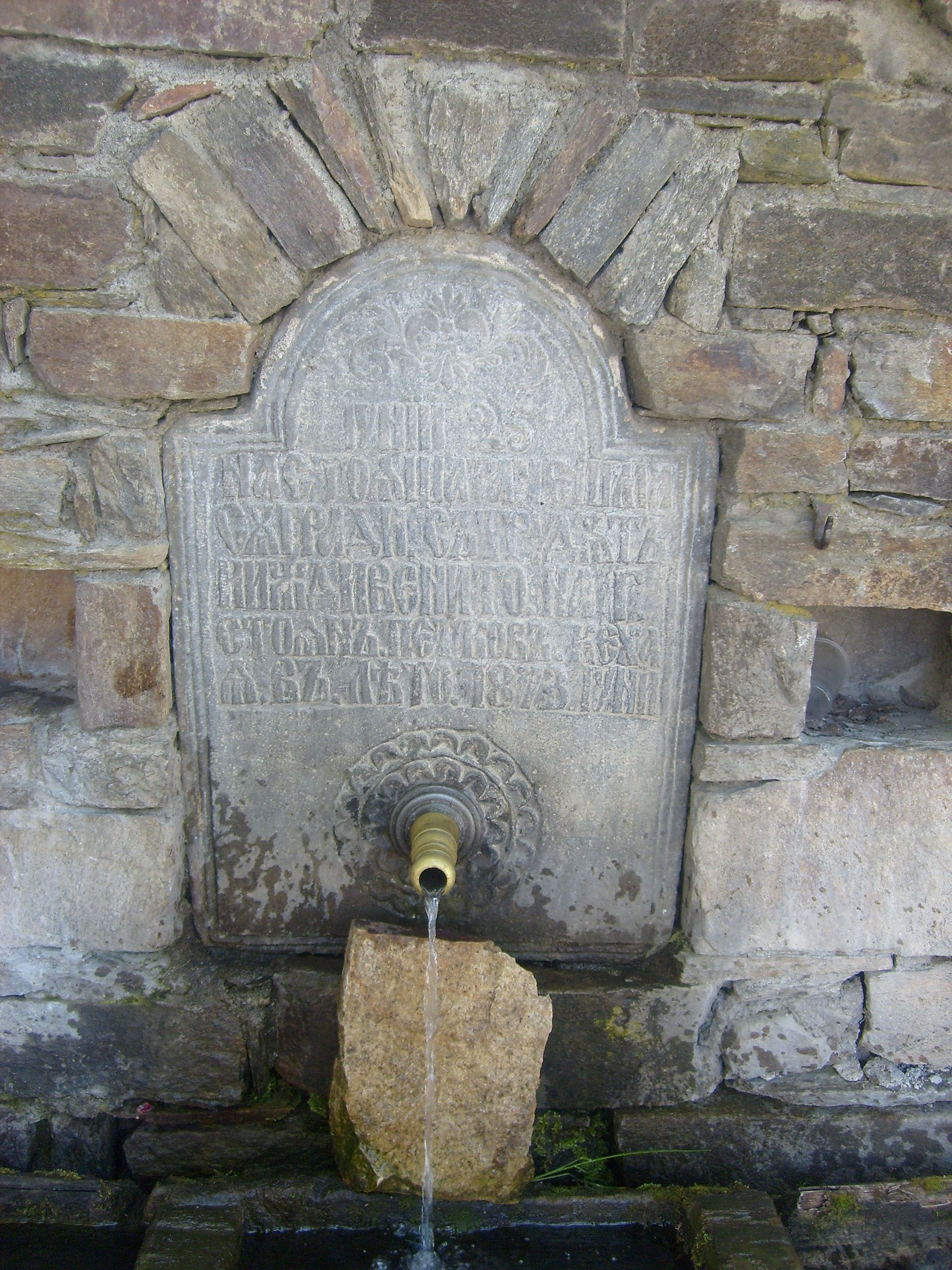 Kovachevitsa, Blagoevgrad Province, Bulgaria